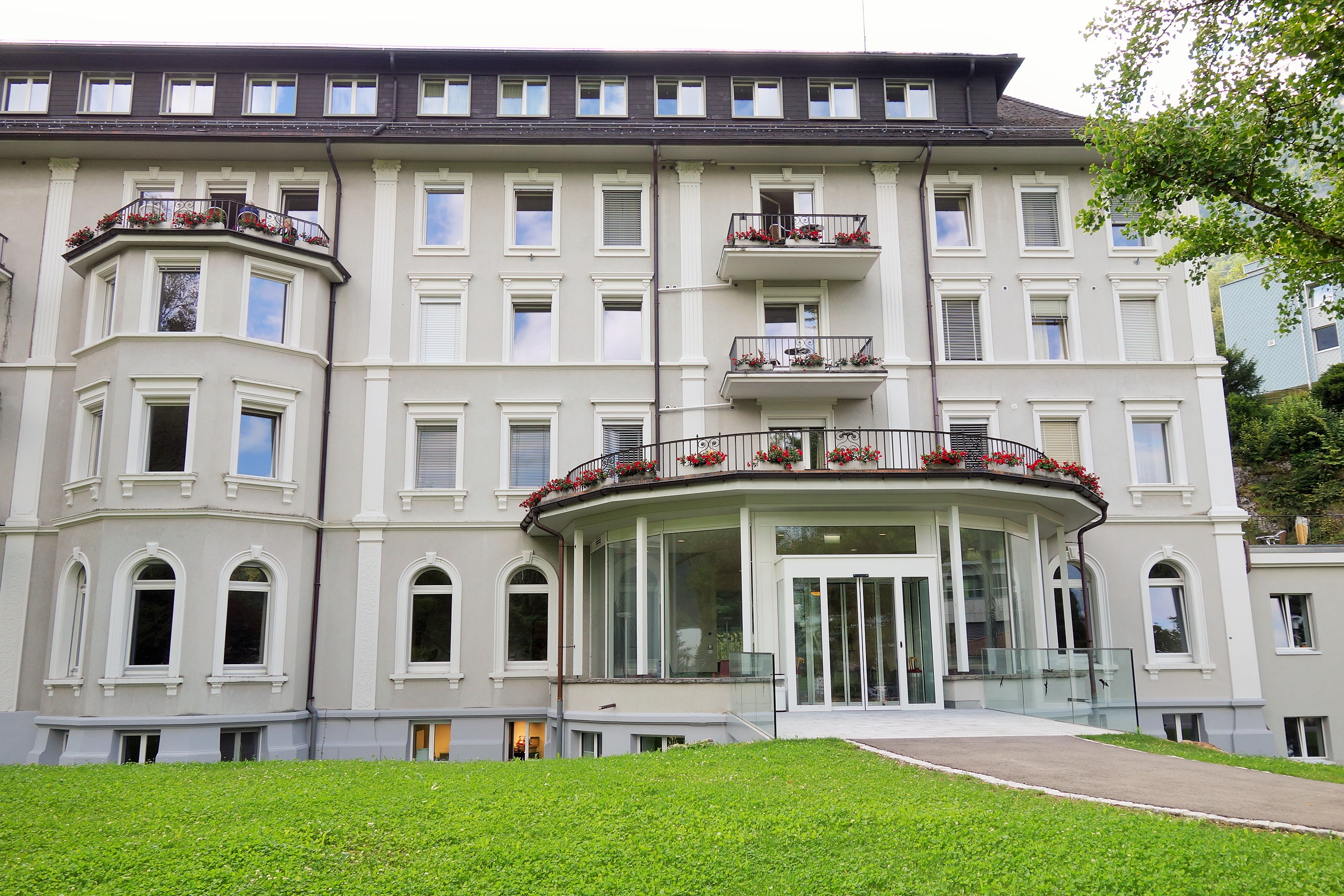 Willigen, Schattenhalb BE, Schweiz